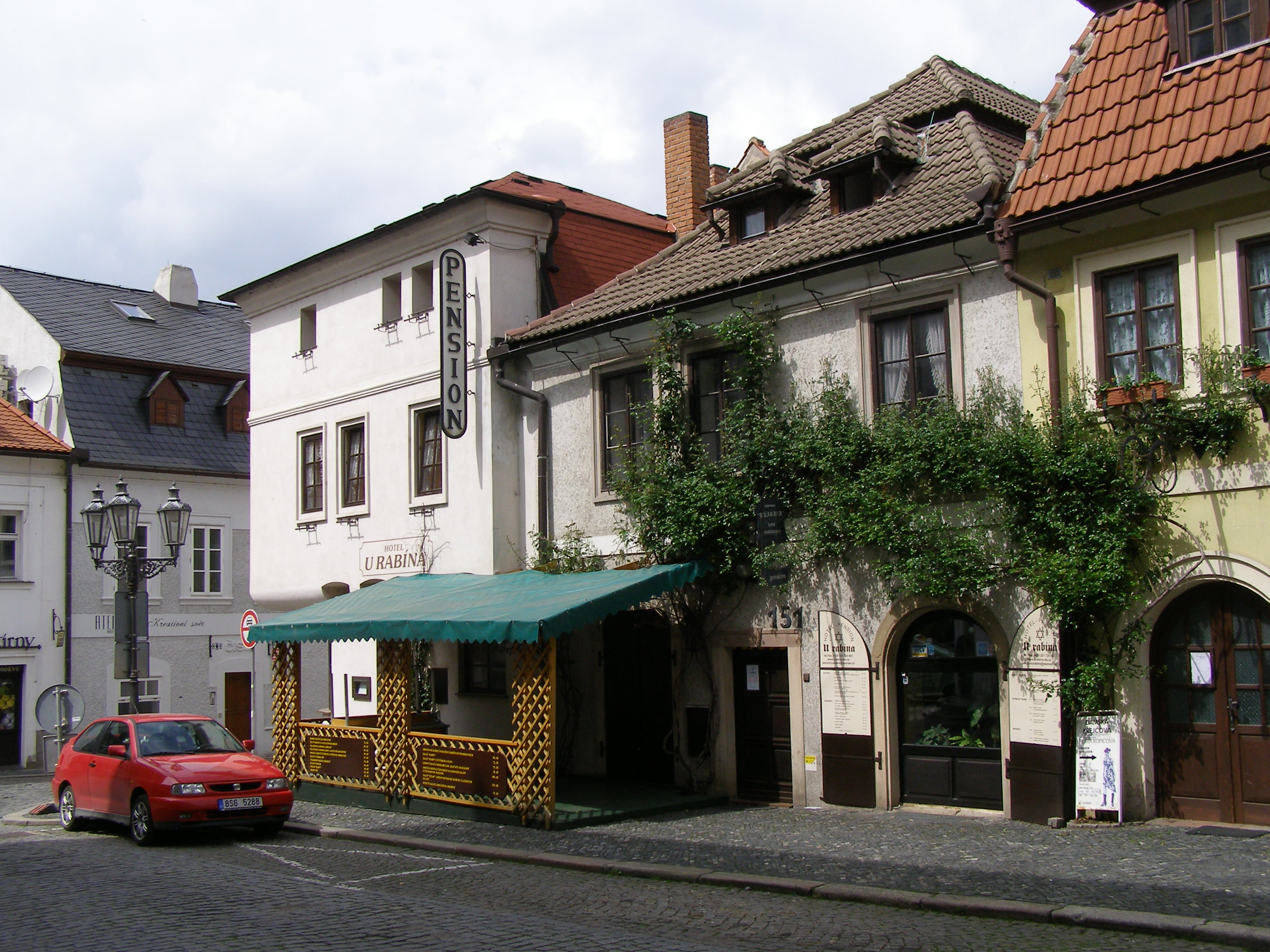 Jüdisches Viertel in Kolín (Tschechische Republik) heute, Ecke Na Hradbách / Karoliny Světlé